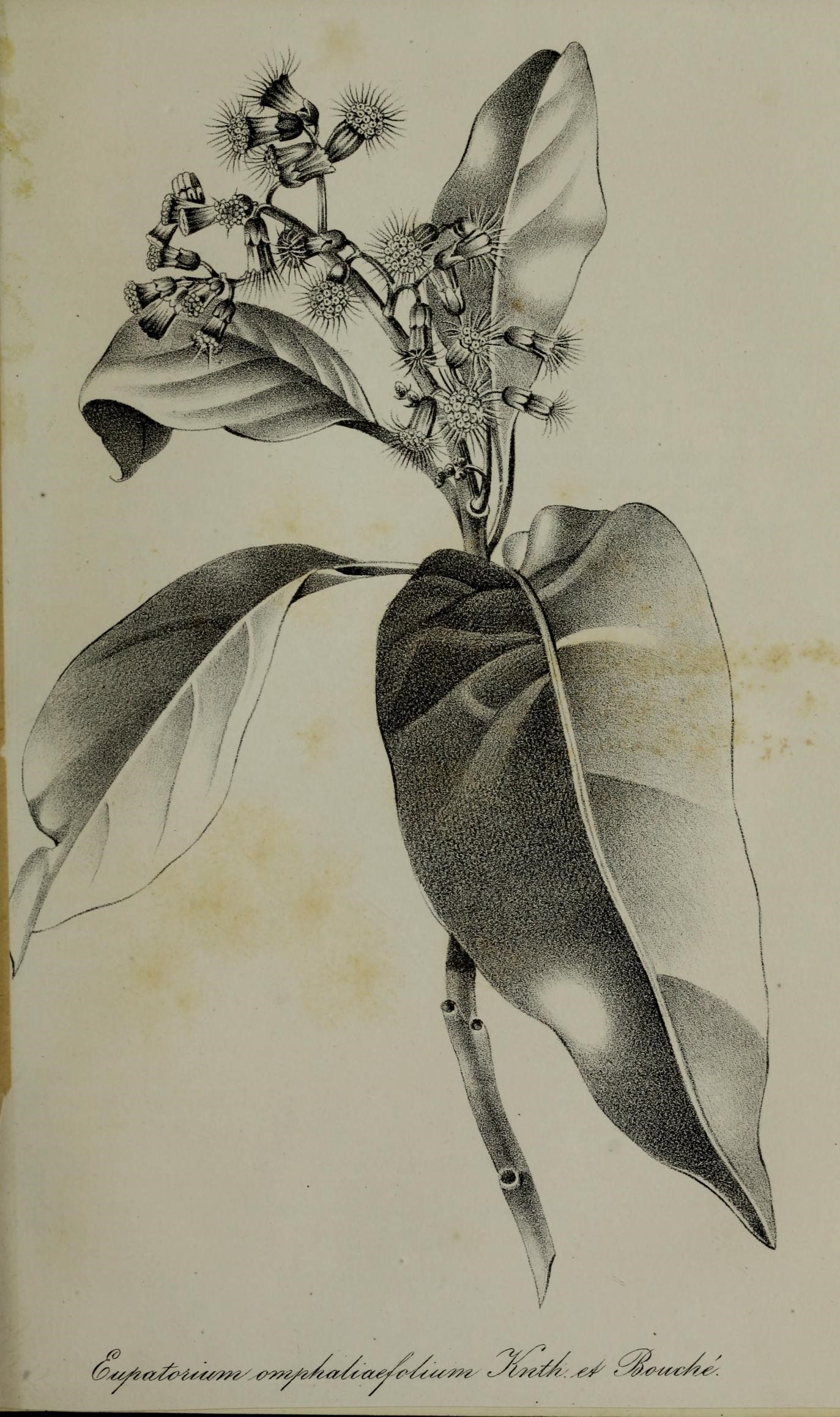 Gartenflora.